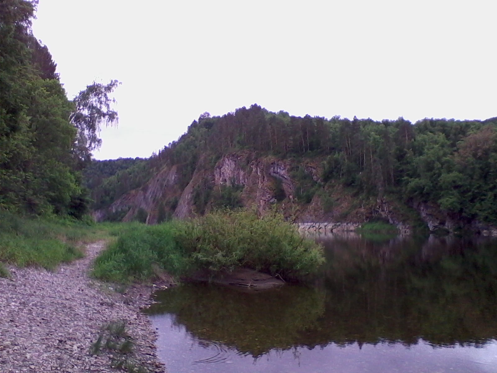 Башкирский государственный природный заповедник, Бурзянский район This image is related to the protected area of Russia number 0200099